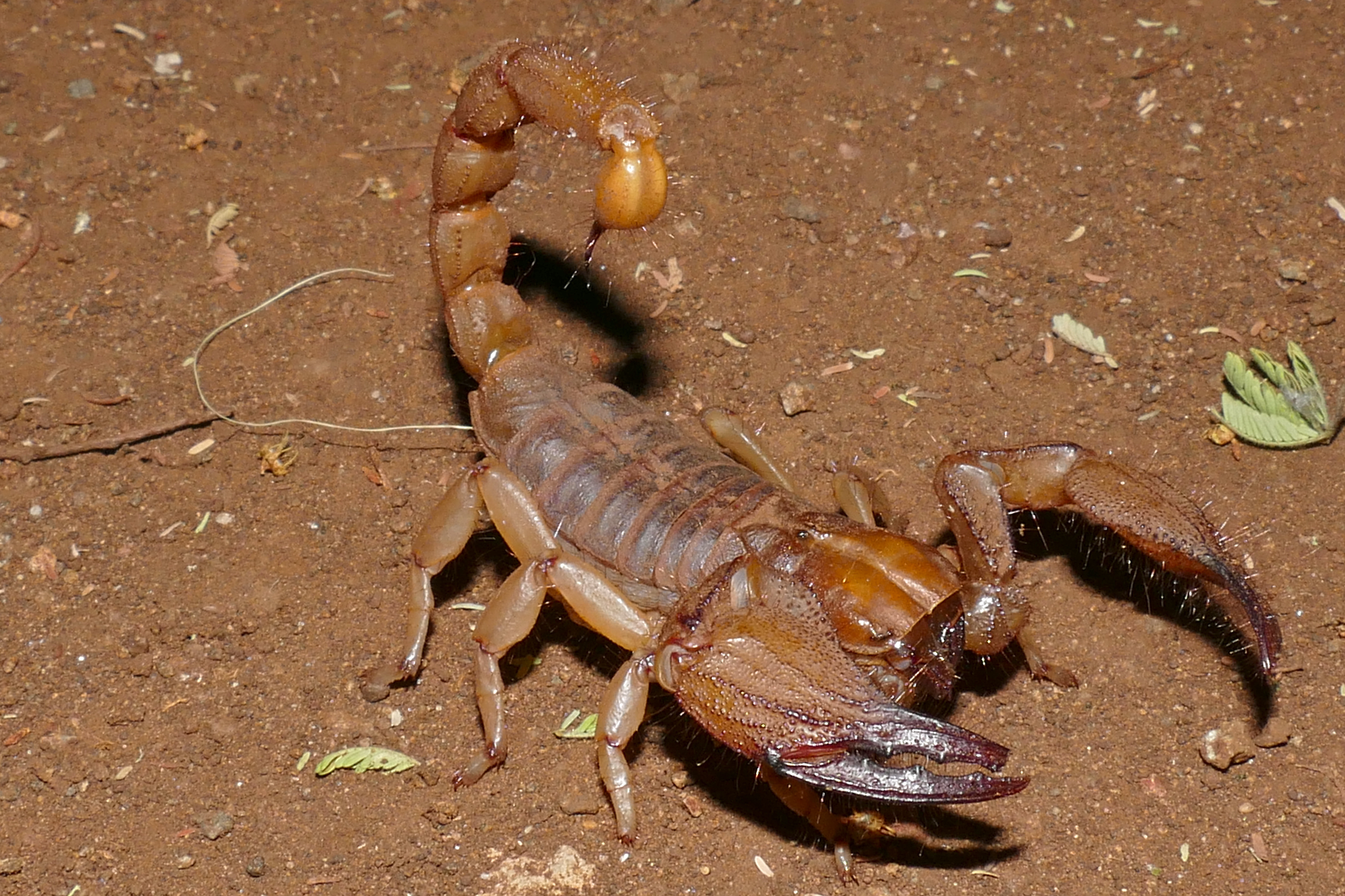 Lower Sabie Camp, Kruger NP, SOUTH AFRICA